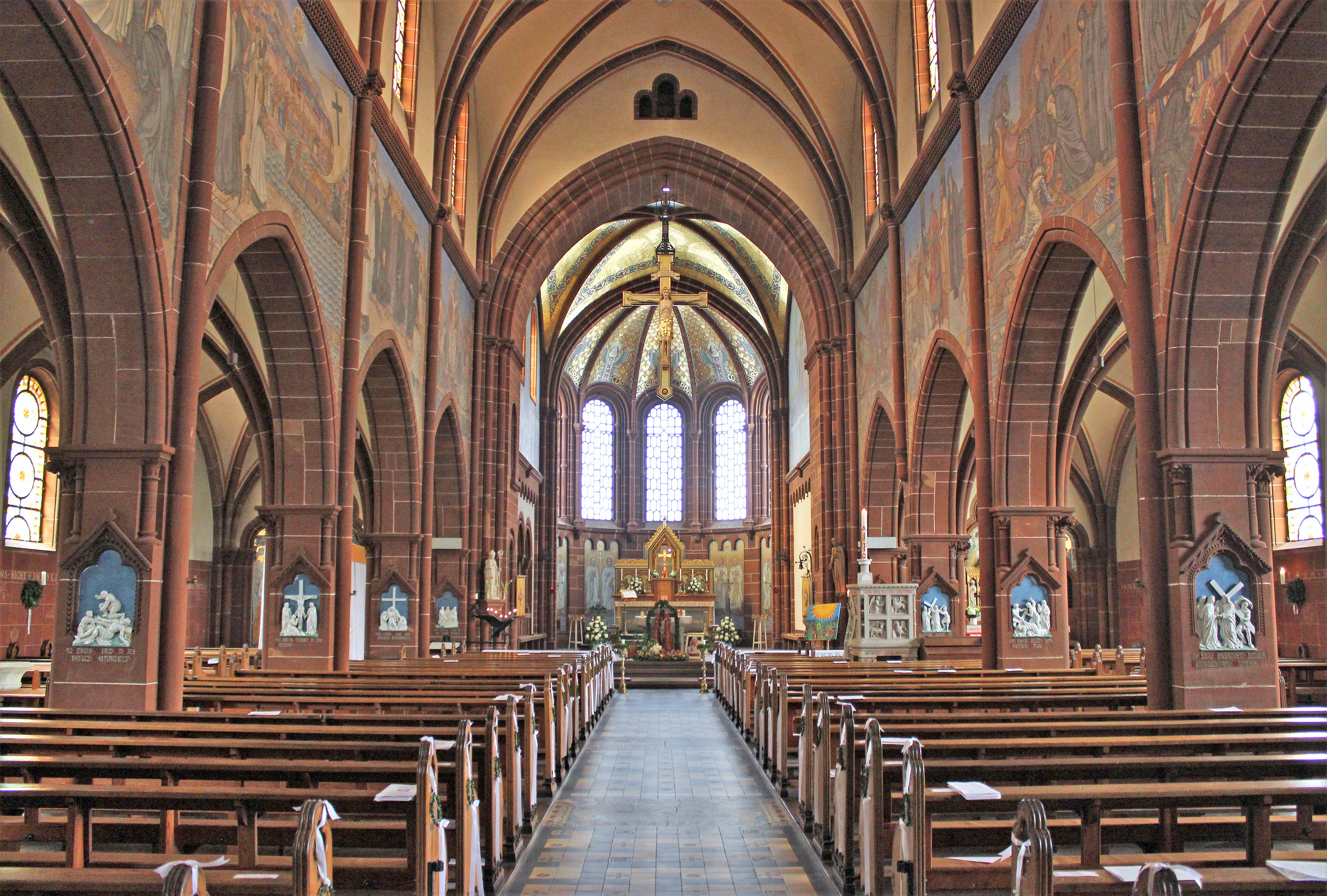 Blick ins Innere der katholischen Pfarr- und Wallfahrtskirche St. Lutwinus in Mettlach, Landkreis Merzig-Wadern, Saarland